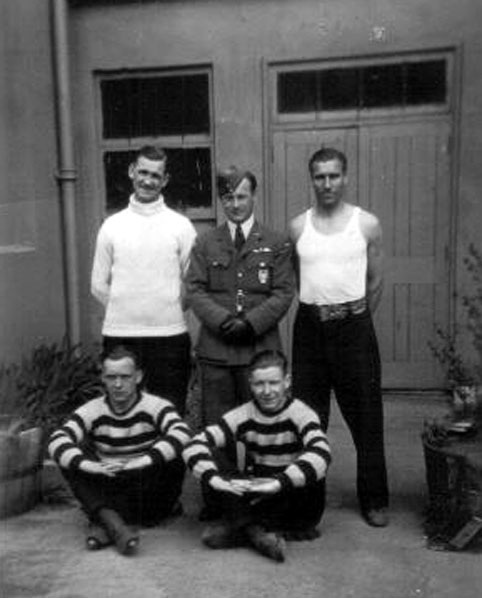 Zdjęcie (ze zbiorów rodzinnych) zrobione w Hornchurch 12 sierpnia 1940 r.